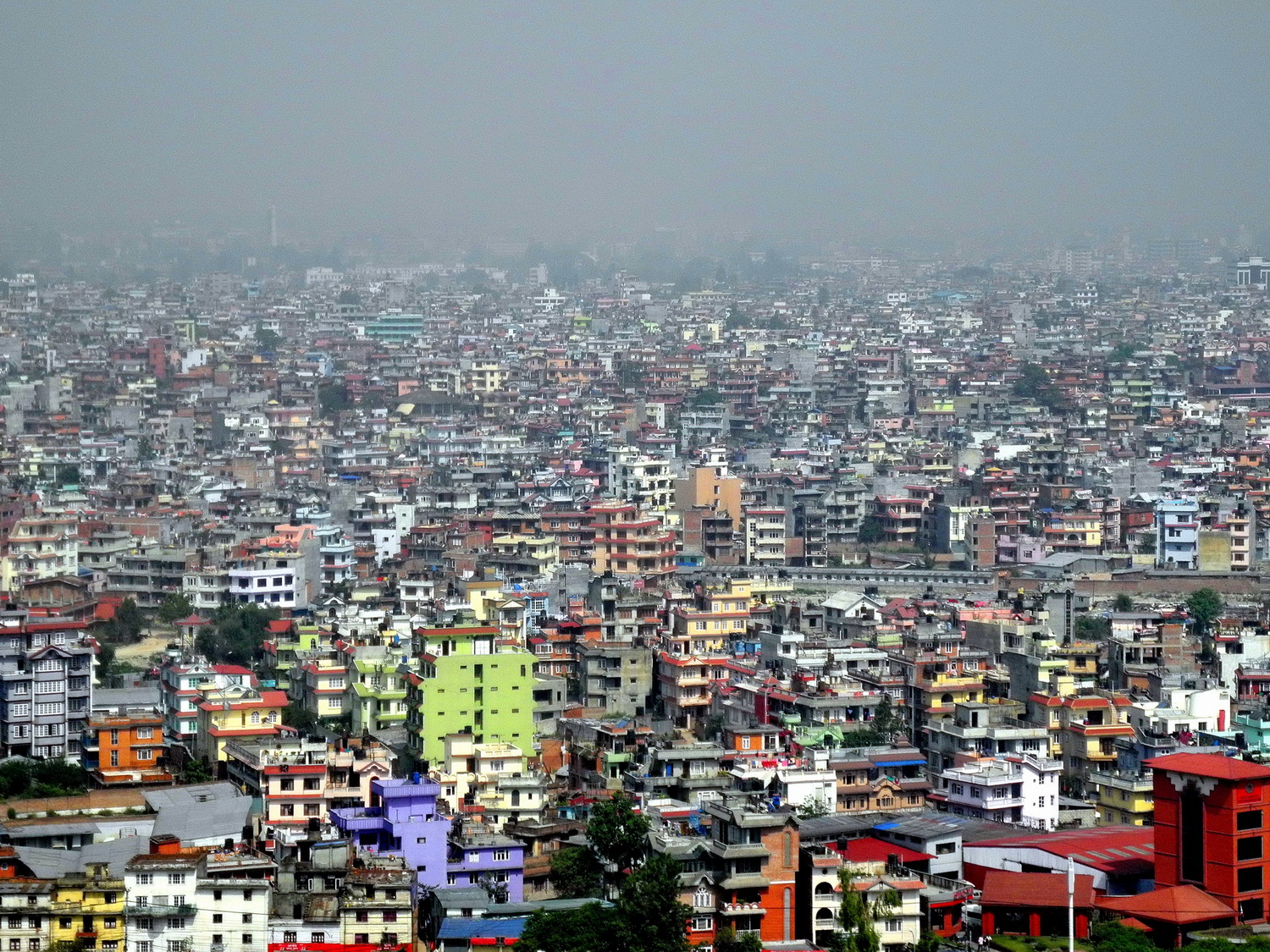 Kathmandu, vue aérienne au décollage